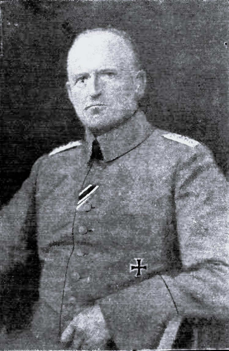 Portrait des Generalmajors v. Heynitz.